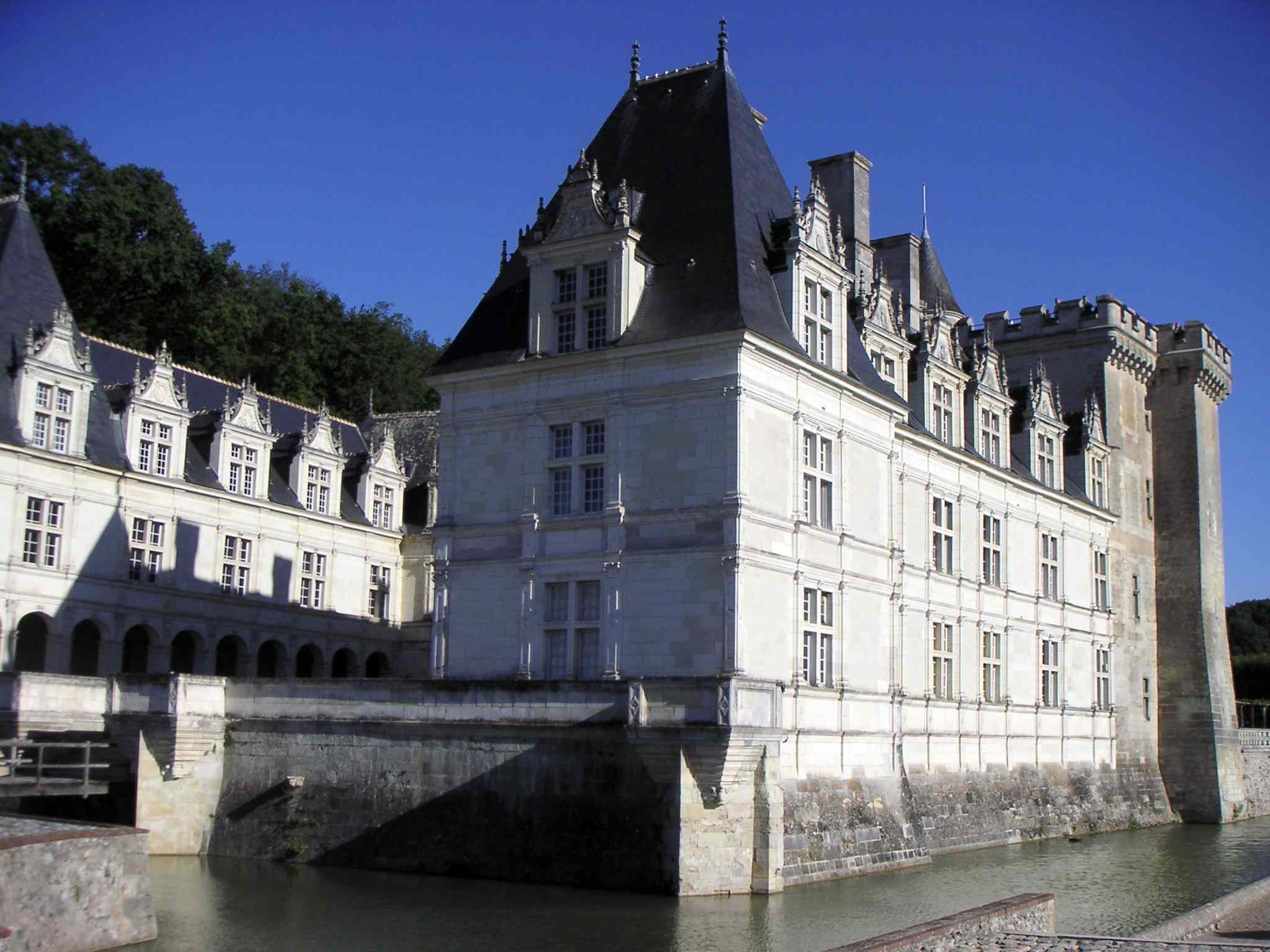 Vue extérieure de l'aile droite du château de Villandry (France)